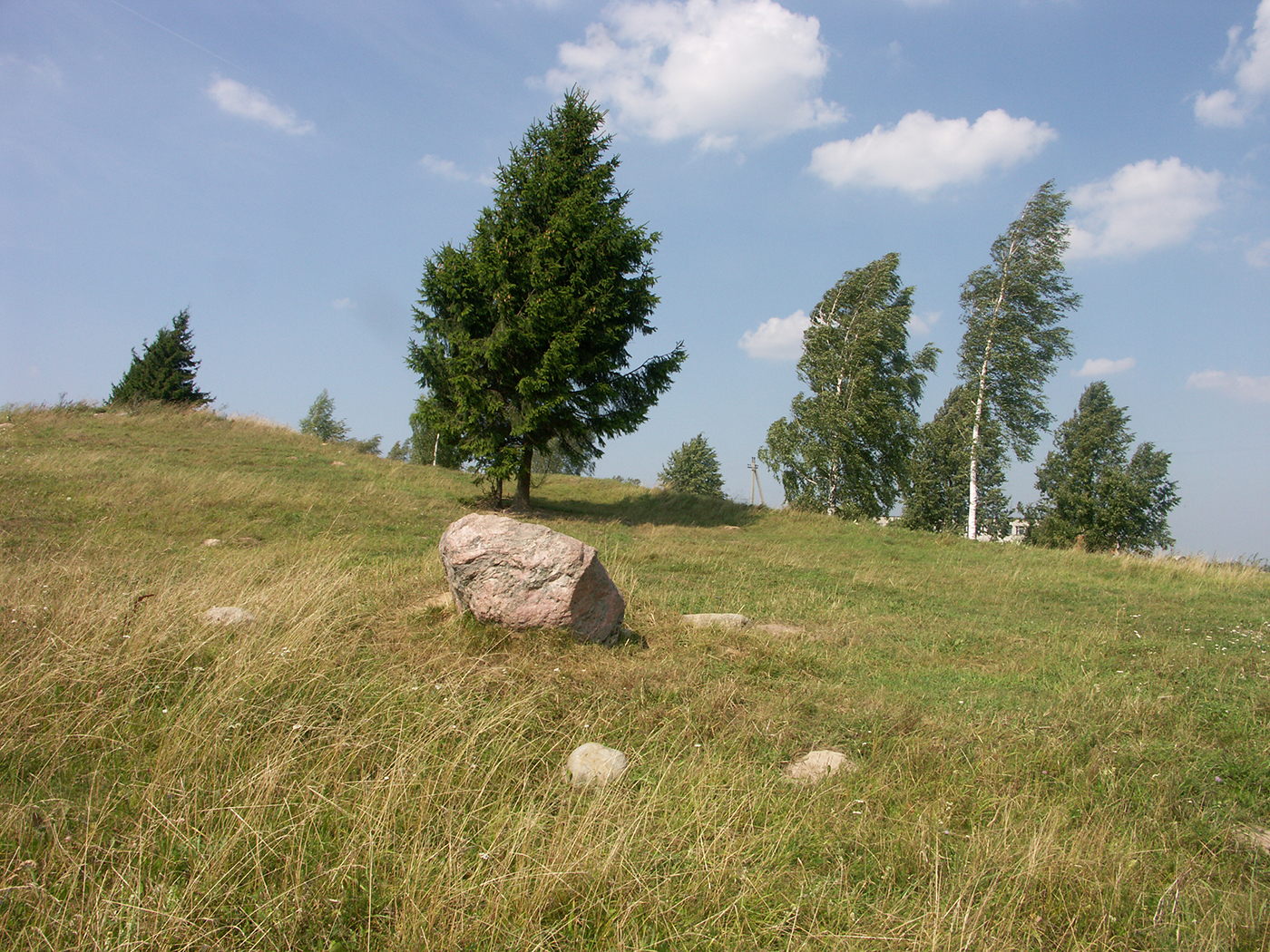 Место расстрела евреев из гетто деревни Иказнь Браславского района в 1942 году.